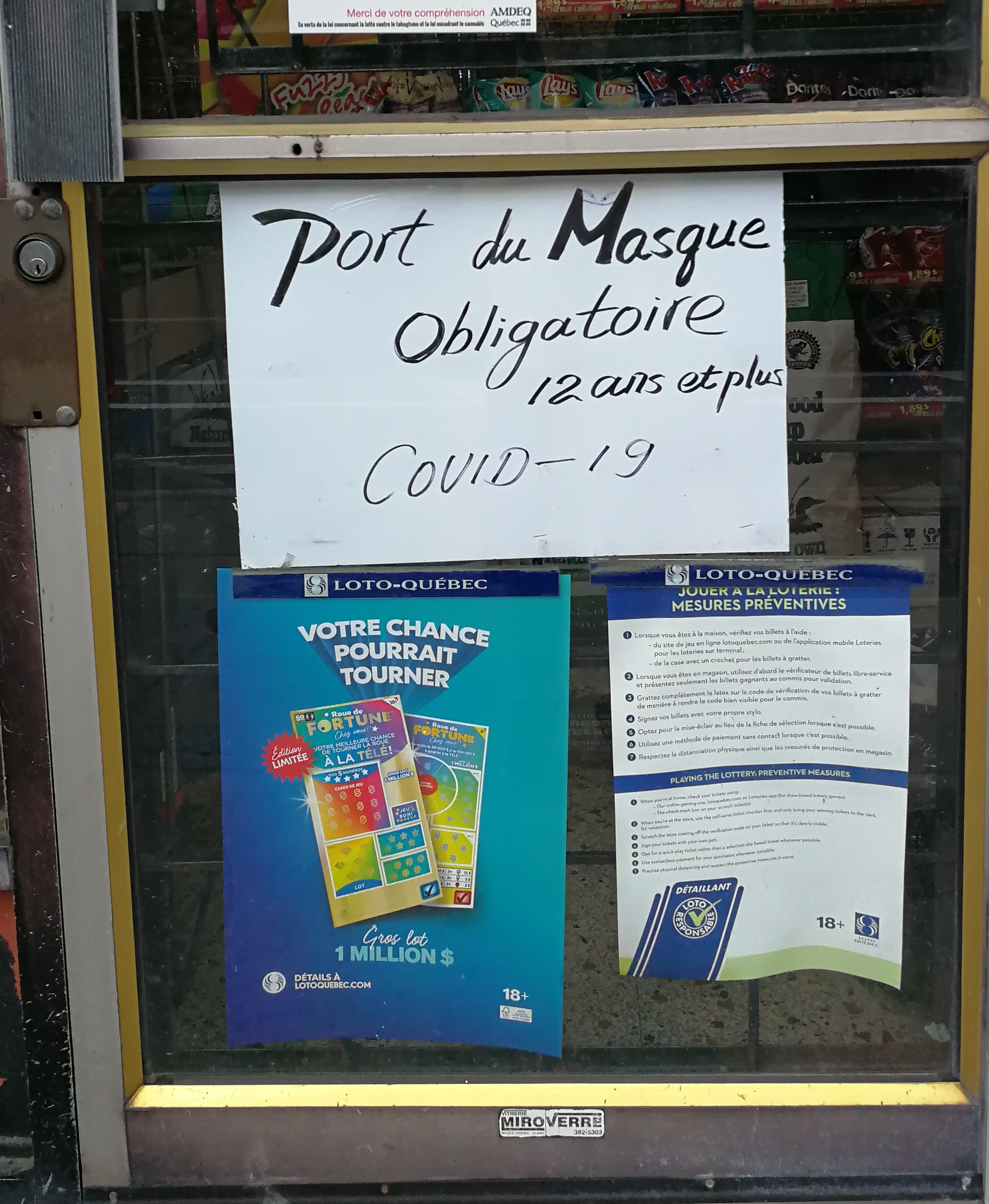 Affiche dans une porte de dépanneur indiquant que le port du masque est obligatoire.